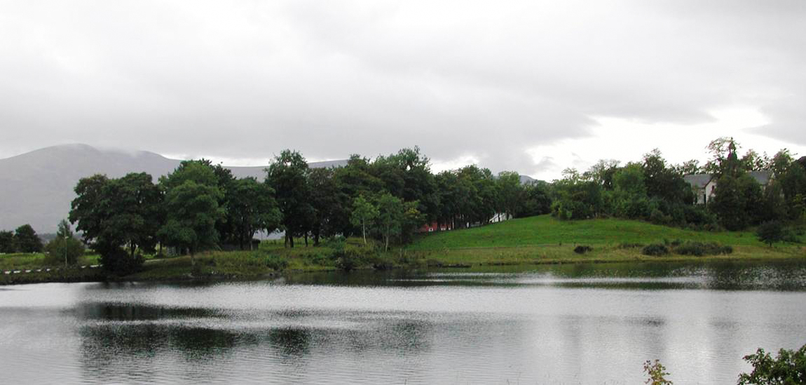 Borgundkaupangen